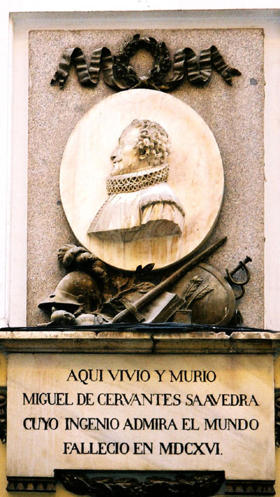 Bajorrelieve conmemorativo en la casa de Cervantes de Madrid